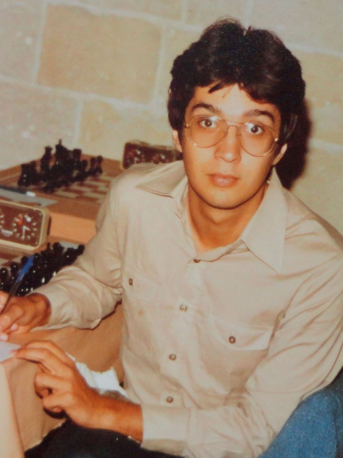 Jaime Sunye Neto, Schacholympiade 1980 in Valletta auf Malta.